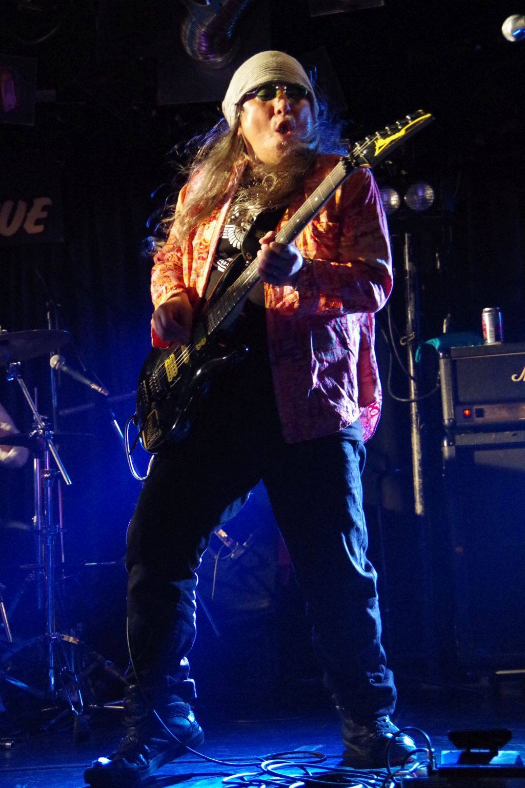 Saybow&theR+X+S